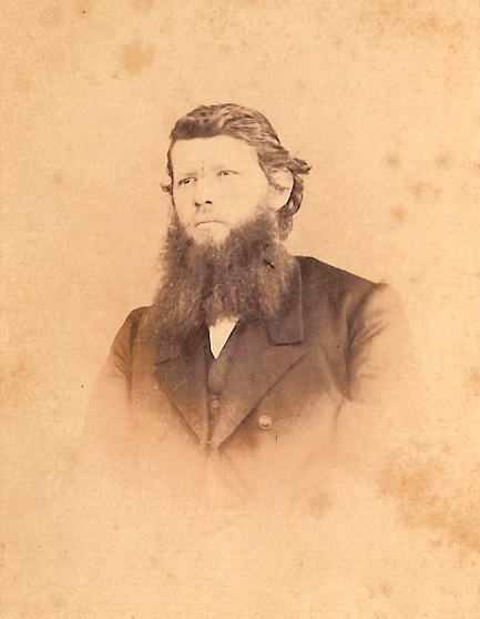 Ludwig Heinrich Graf von Holleben (* 5. Dezember 1832 in Rudolstadt; † 2. April 1894 in Rio Grande, Brasilien)